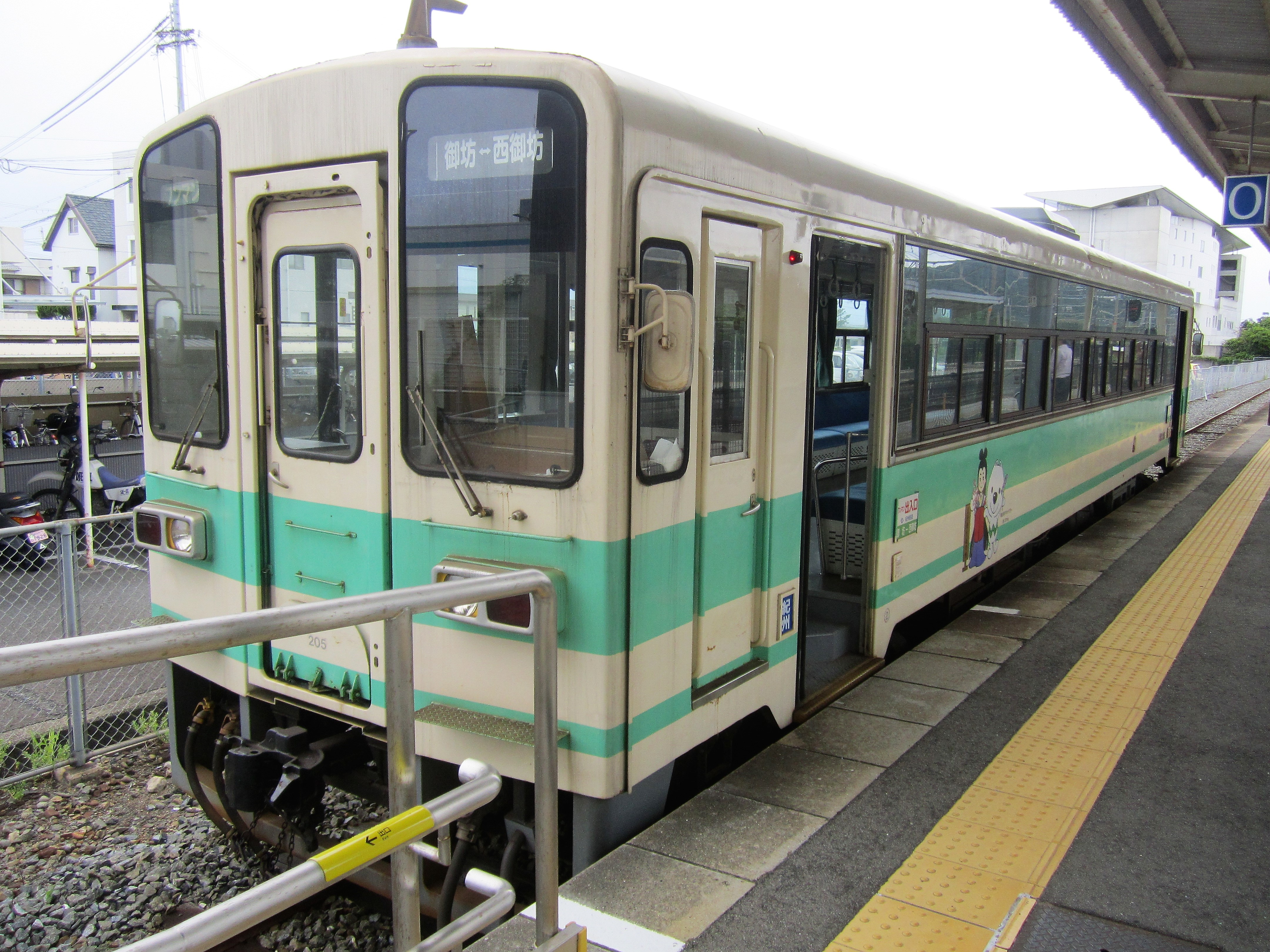 御坊駅に停車中の紀州鉄道KR205